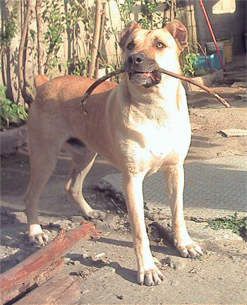 Cimarrón uruguayo llamado Dingo, foto tomada año 2004. Localidad Cerrito de la Victoria, Montevideo, Uruguay.